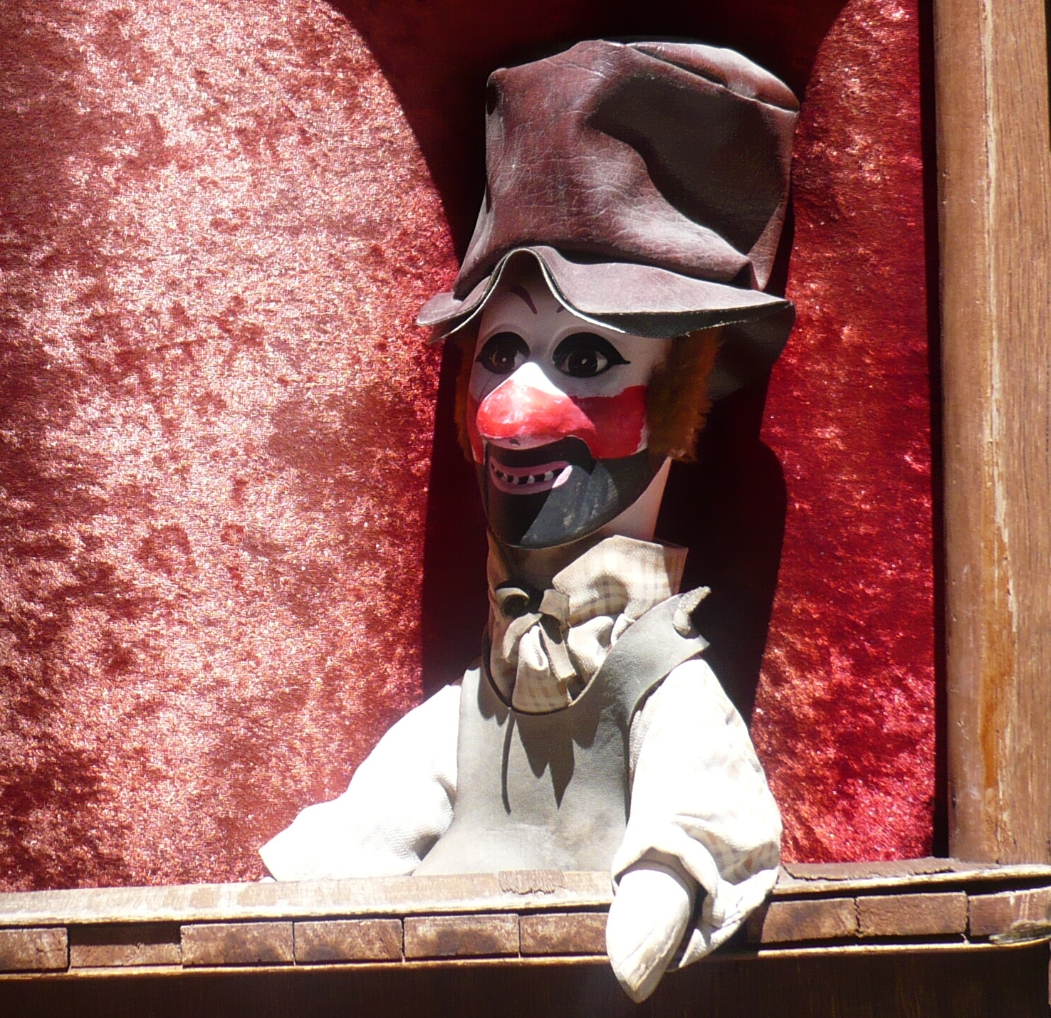 Gnafron à Lyon - gros plan